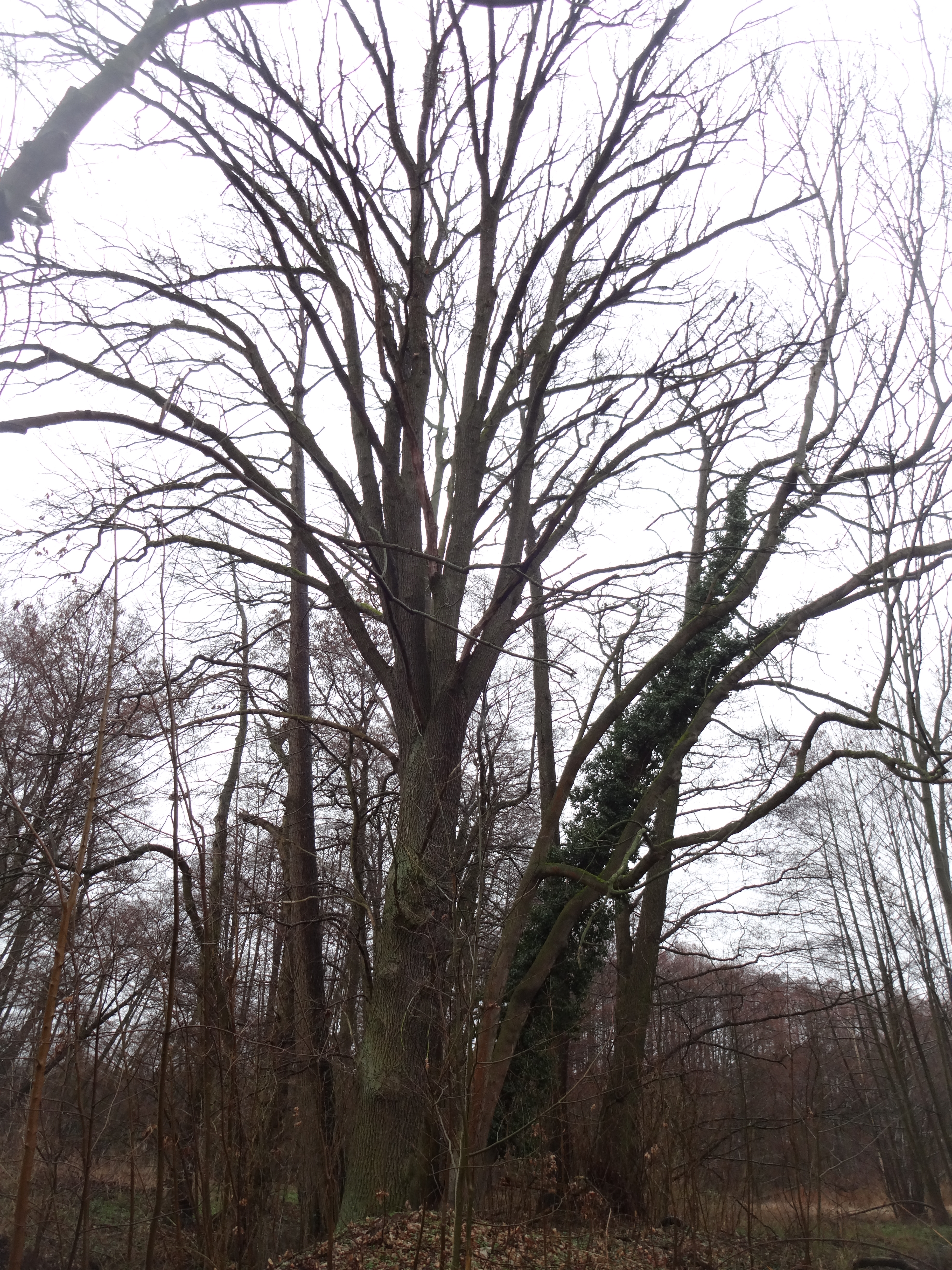 als Naturdenkmal geschützte Stieleiche im Kloster Lehnin